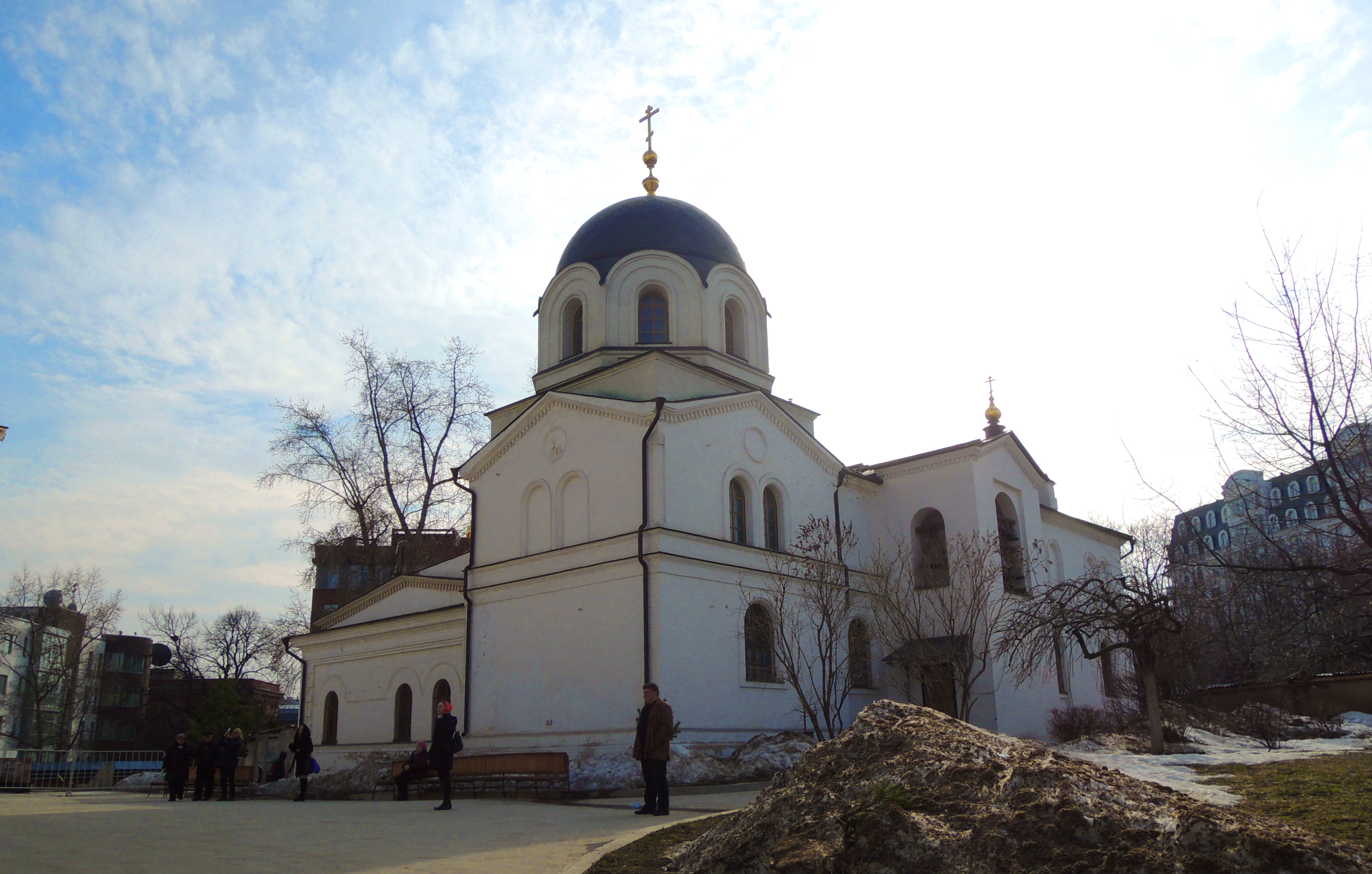 Зачатьевский монастырь